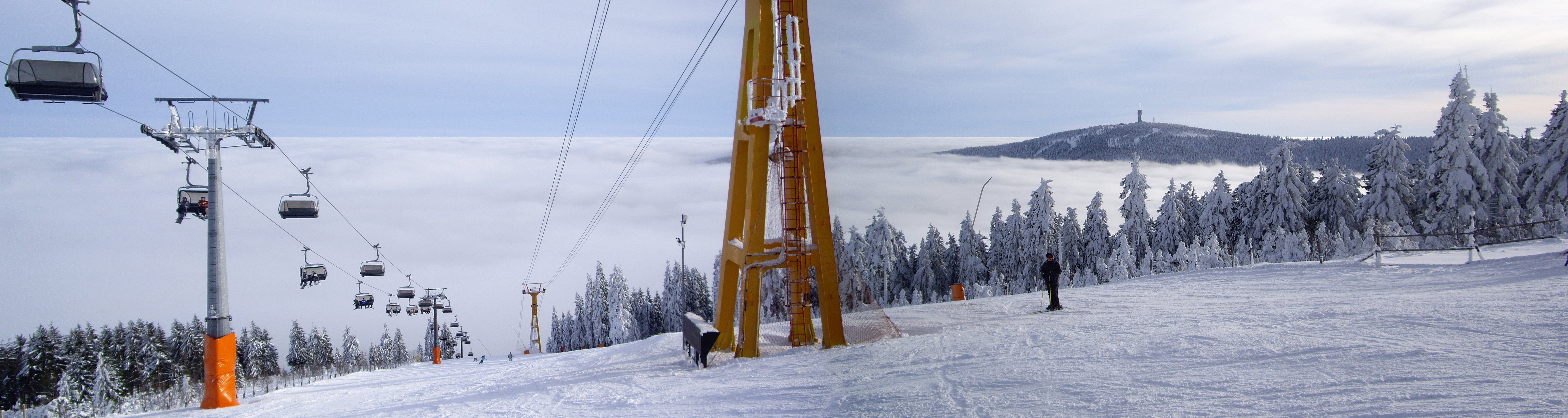 Atemberaubender Blick bei Sonnenschein vom Großen Fichtelberg im sächsischen Oberwiesenthal. Wetterwarte.